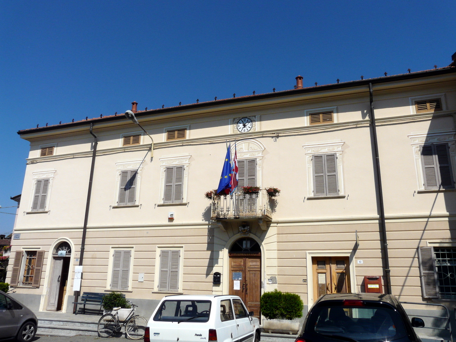 Il municipio di Fresonara, Piemonte, Italia